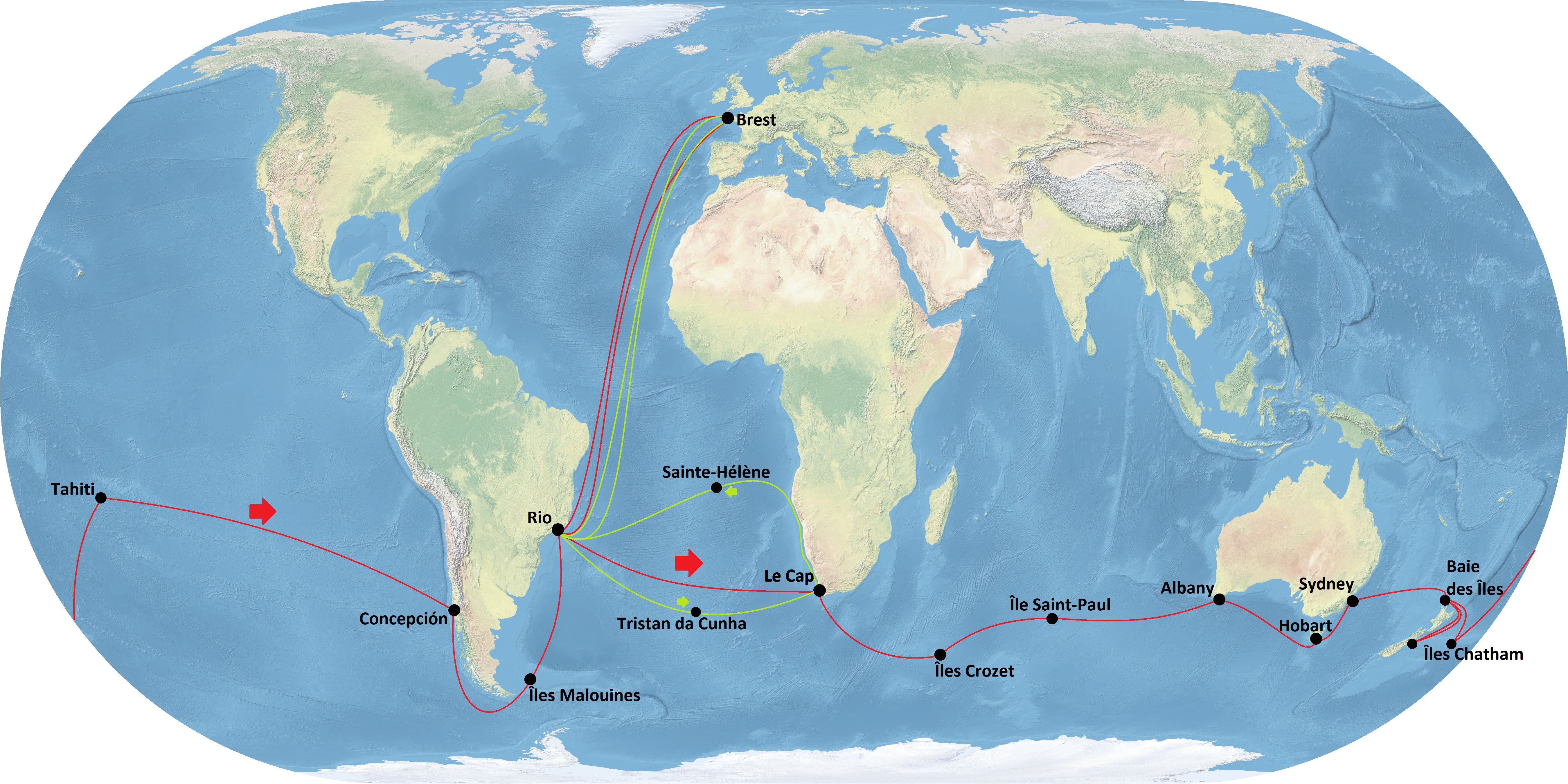 Trajets de deux campagnes de protection des baleiniers français effectuées par la corvette l'Héroïne en 1835-1837 (vert) et 1837-1839 (rouge).